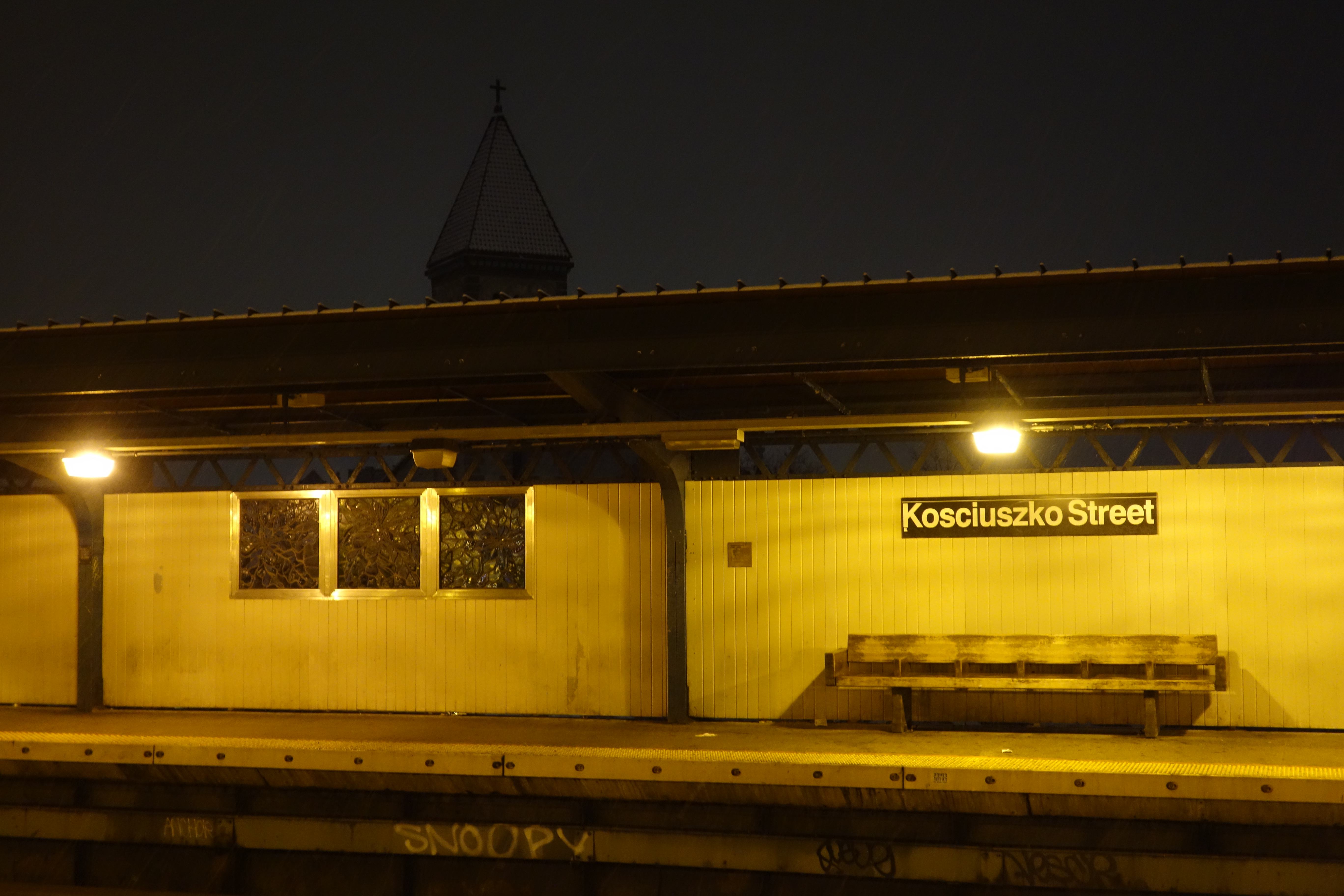 Kosciuszko Street, Brooklyn